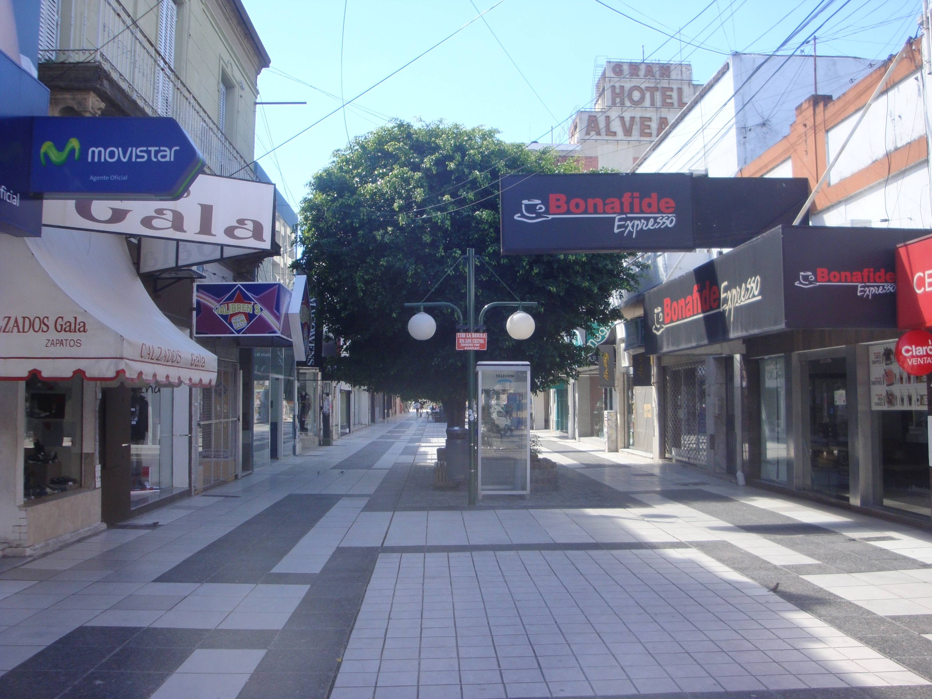 Peatonal San Martín al 600, Paraná, Provincia de Entre Ríos, Argentina.